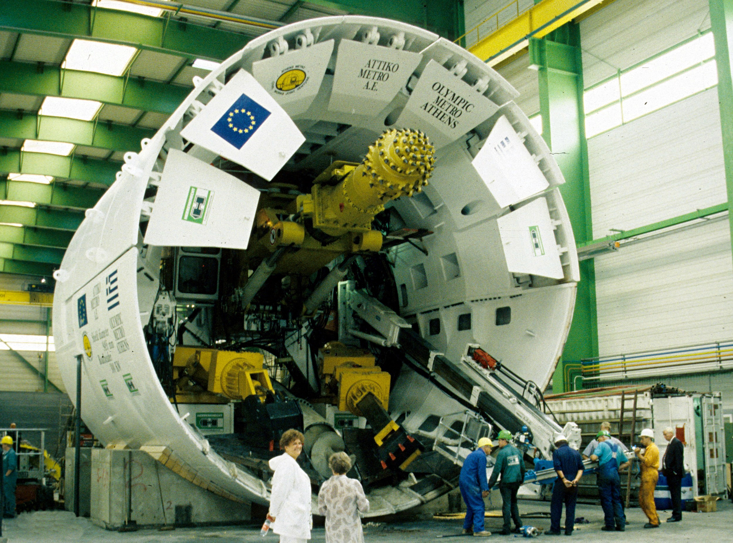 Öröm